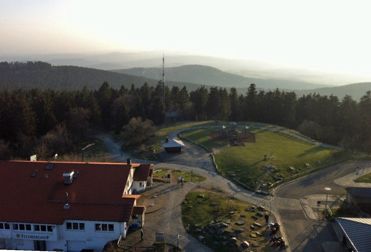 Blick vom Aussichtsturm auf dem Großer Feldberg zum Kleiner Feldberg, Taunus, Hessen, Deutschland